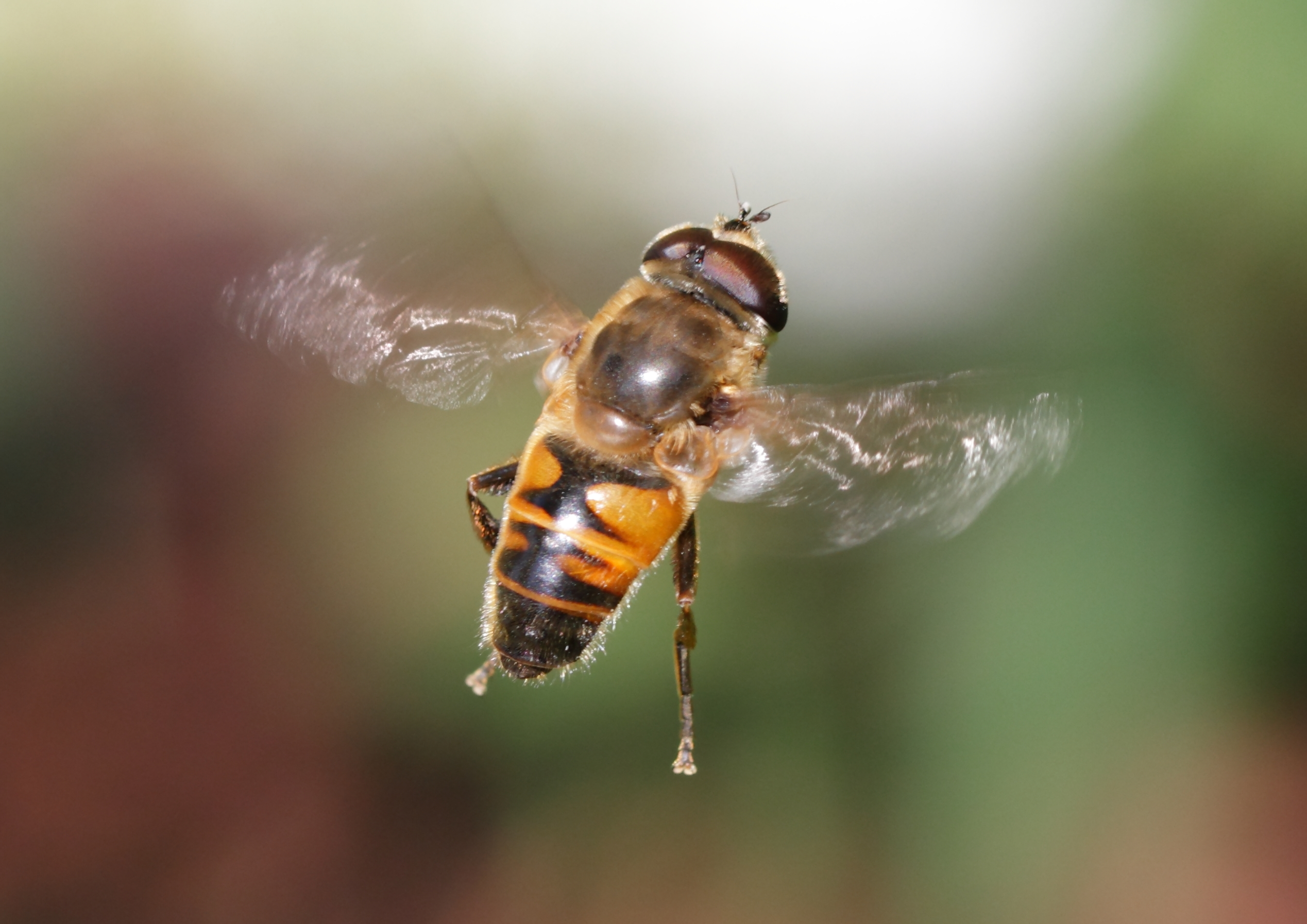 Eine Mistbiene Eristalis tenax im Schlosspark Schönbrunn.